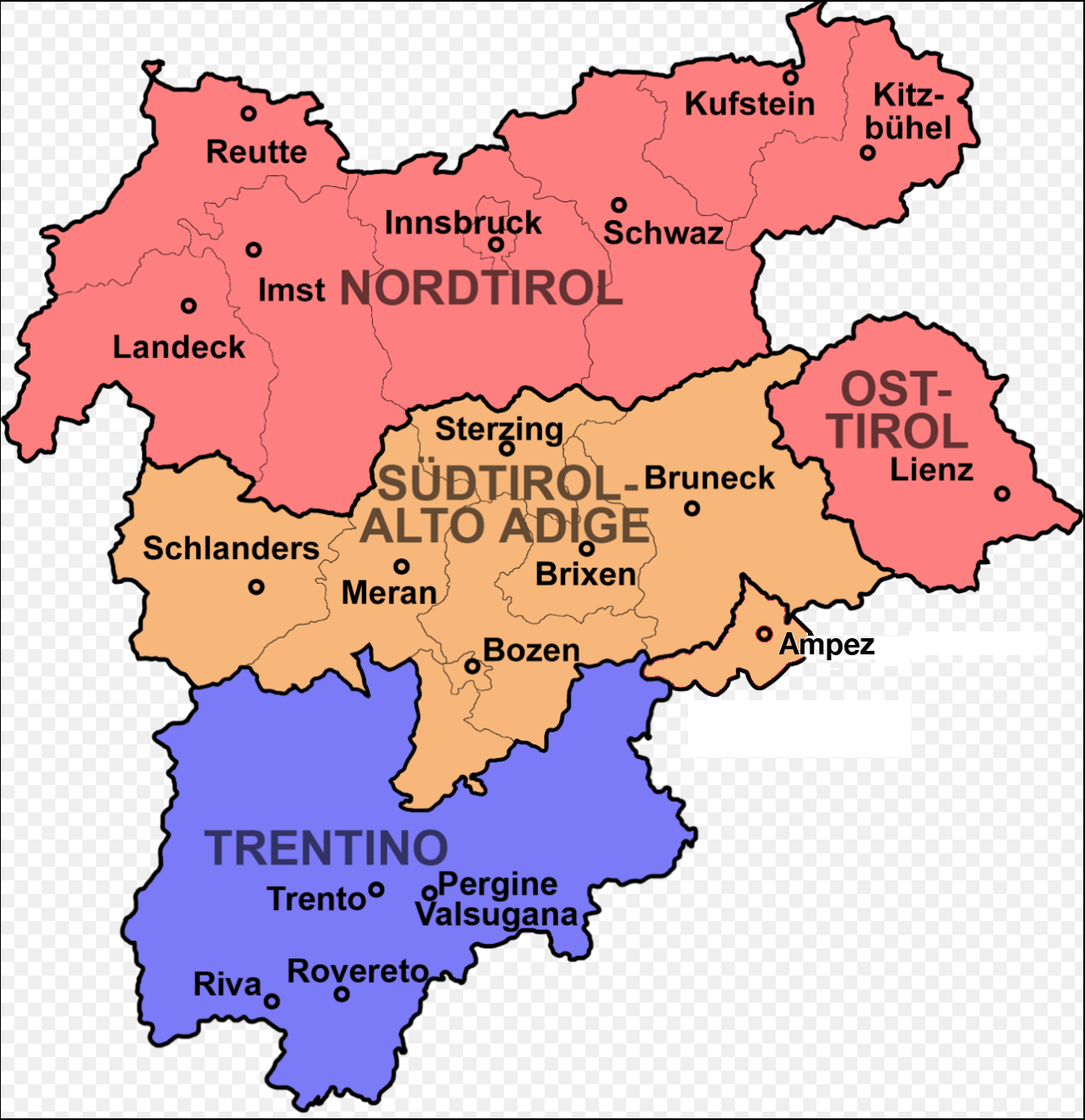 Karte der Region Tirol. Der ladinische Landesteil Fodom/Buchenstein mit dem Hauptort Anpëz fehlt. Dieser Landesteil wurde zu beginn des Krieges aus strategischen Gründen geräumt und die Frontlinie nördlich davon (drei Zinnen, Monte Piano) zurückverlegt. Fodom/Buchenstein wurde nach dem 1. Weltkrieg in die Provinz Belluno eingegliedert.